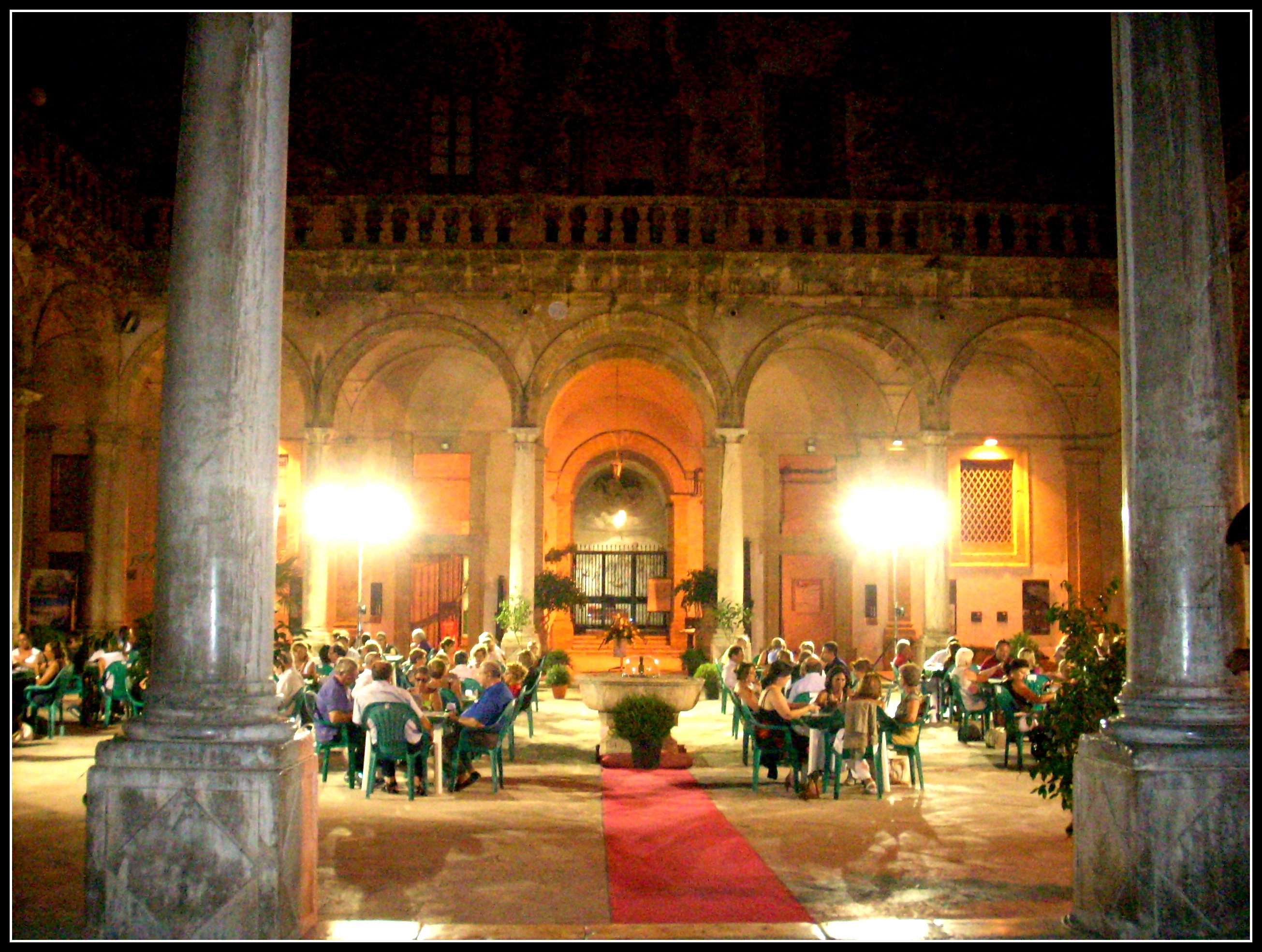 Torreo notturno di burraco nel cortile del secentesco Palazzo del Comune di Sciacca